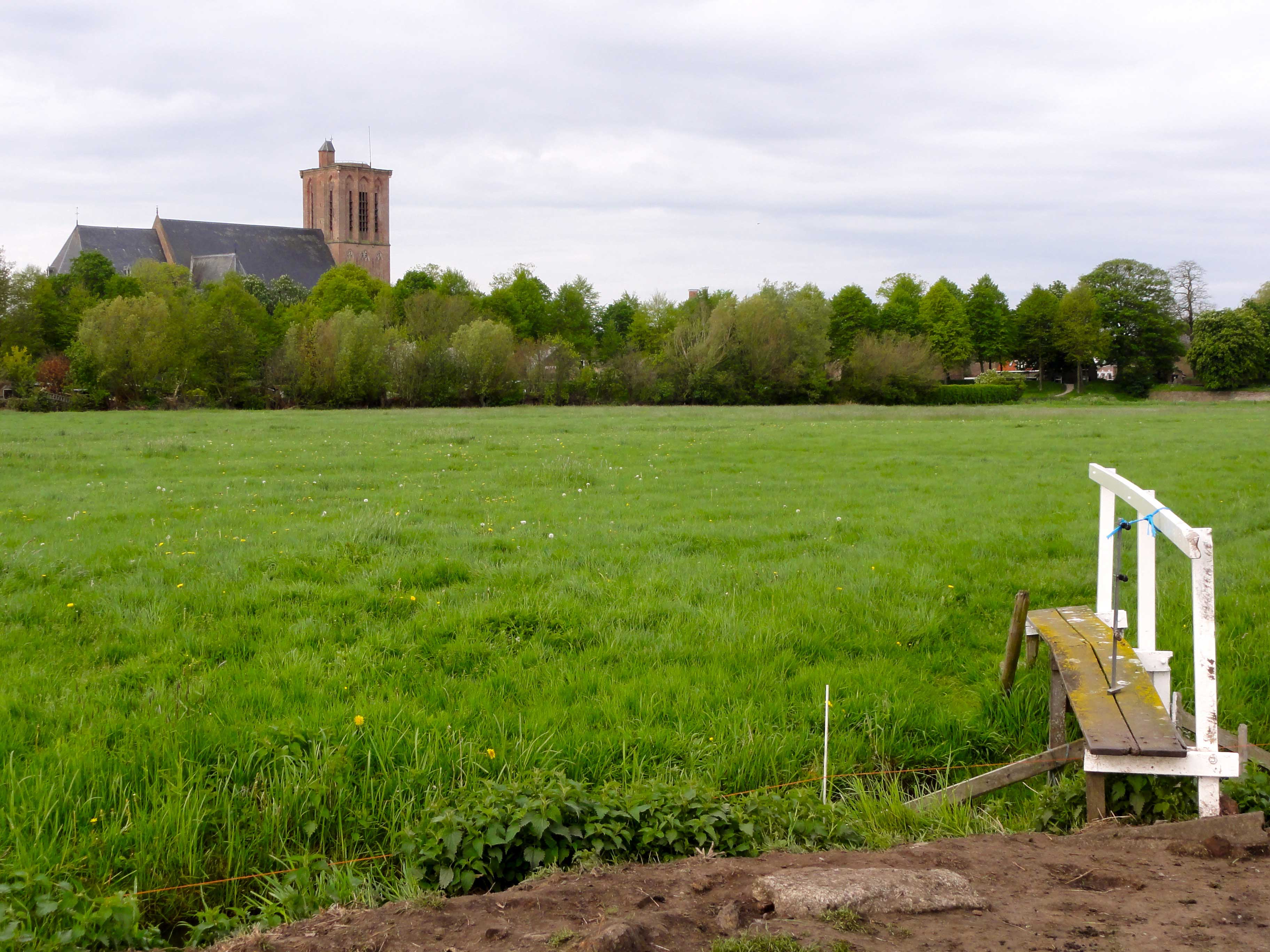 De Zeuven Vlonders, oud kerkenpad nabij Elburg